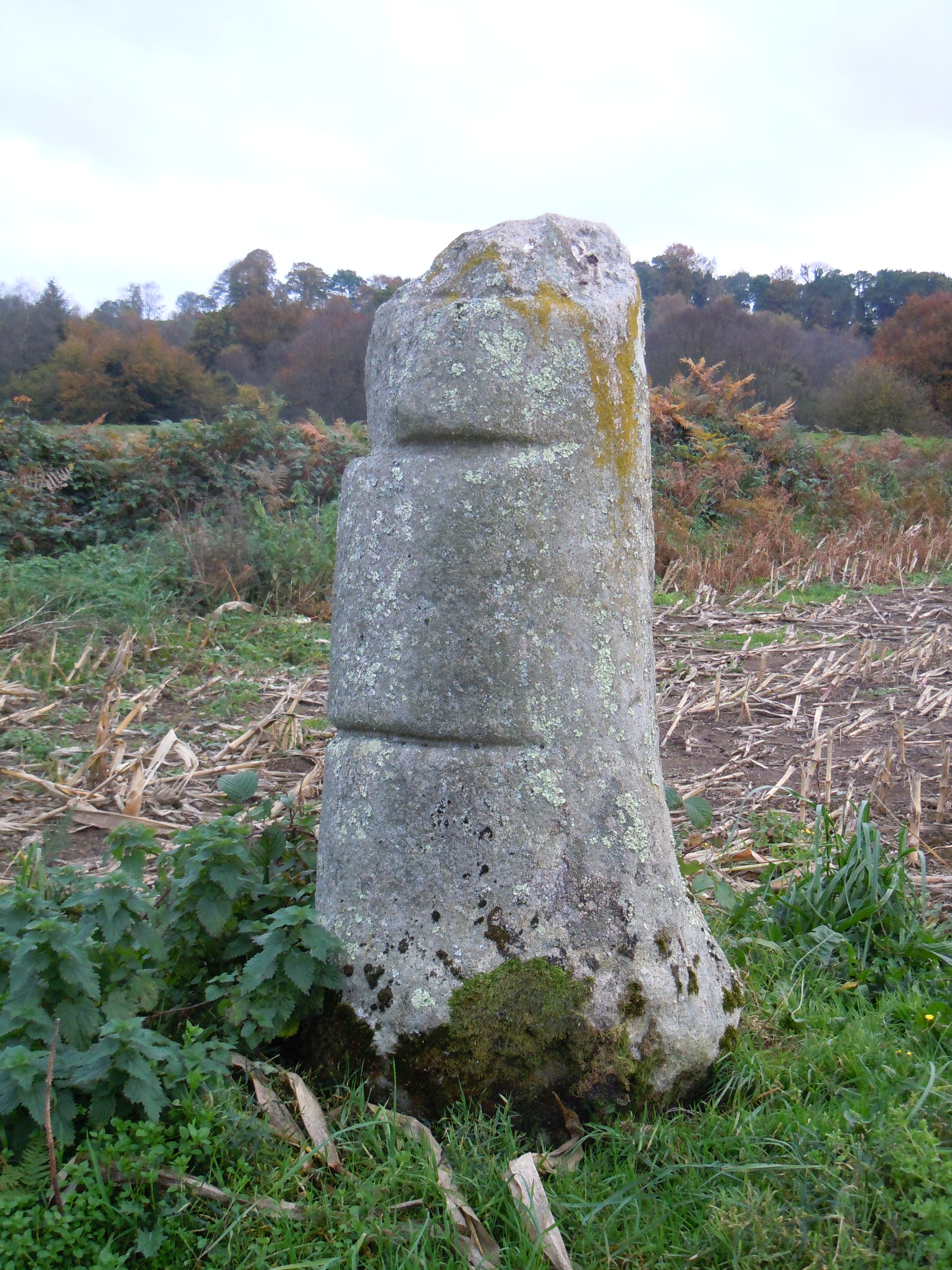 borne située au bord de l'ancienne voie romaine reliant les cités de Vorgium et Darioritum, à Séglien, dans le département du MorbihanLa pierre anépigraphe CIL XVII2, 00395 sur Epigraphik-Datenbank Clauss-Slaby.